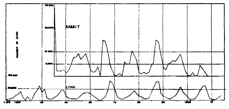 Ciclos populacionais do lince é da lebre estão altamente sincronizado